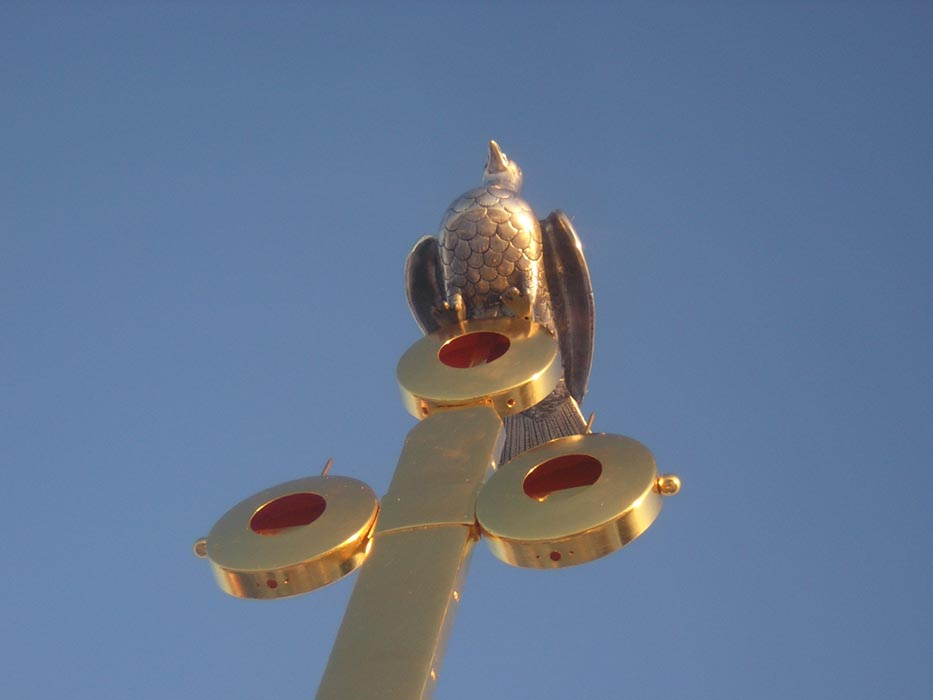 Голуб на кресте Софийского собора в Великом Новгороде